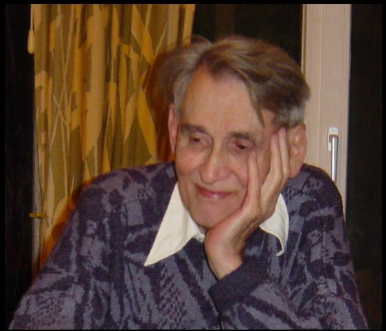 Foto von Ullrich Trendelenburg